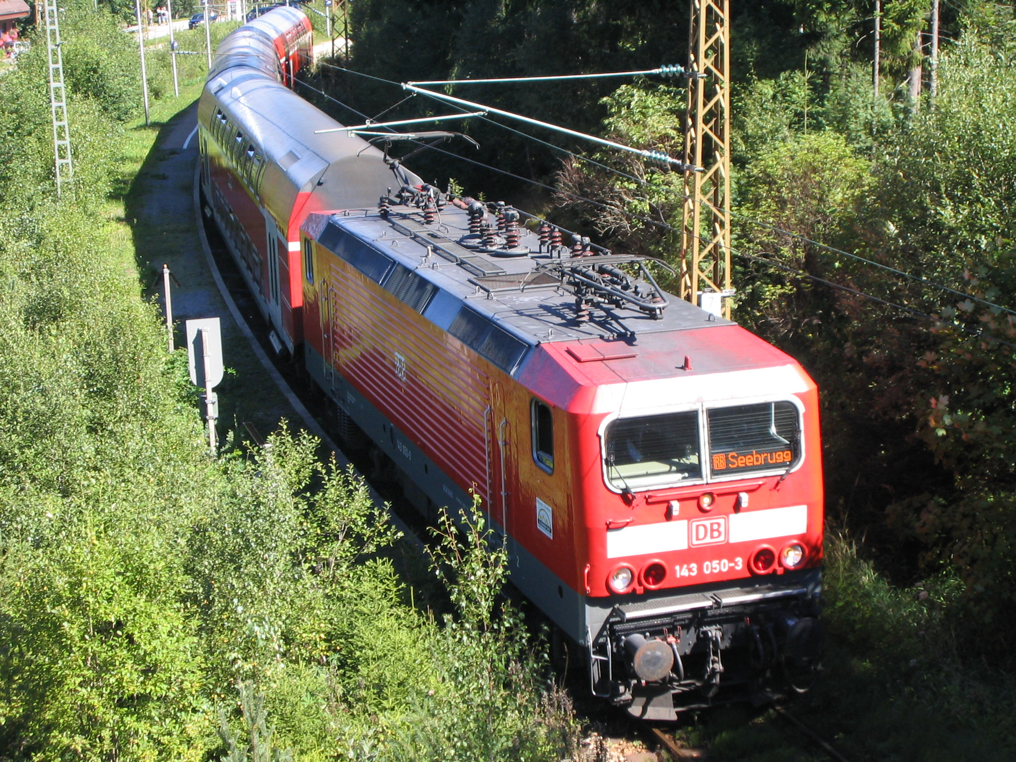 DB 143 050 mit Doppelstockwagen auf Dreiseenbahn in Feldberg-Bärental